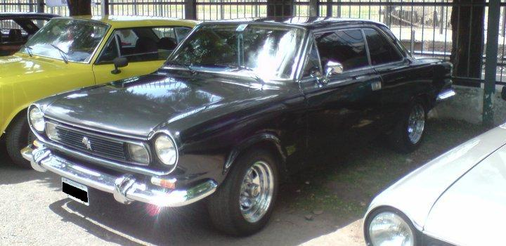 Automóvil IKA Torino, versión Coupé 380 W.